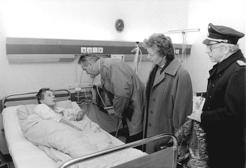 ADN-ZB Grimm-15.2.1988-A Berlin: Zugunglück Der stellvertretende Generaldirektor der Deutschen Reichsbahn Alfred Schultz (3.v.r.) und weitere Reichsbahn-Mitarbeiter besuchten im Krankenhaus "Dr. Salvador Allende" in Köpenick Verletzte der Zugkollision zwischen Schönefeld und Karlshorst, darunter den Schüler D.[...*] K.[...*] aus Ichtershausen, Bezirk Erfurt. [*BArch: Name aus Gründen des Persönlichkeitsrechts anonymisiert]